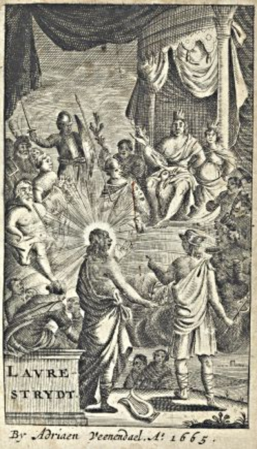 Illustratie van "Lauwer-stryt tusschen Catharina Questiers en Cornelia van der Veer; met eenige Bij-dichten aan, en van haar geschreeven" (Amsterdam, Adriaen Venendael, 1665). Dichtwisseling tussen twee zeventiende-eeuwse dichteressen. Ook: Lauwerstrijd, Lauwerstryd, Lauwerstryt.